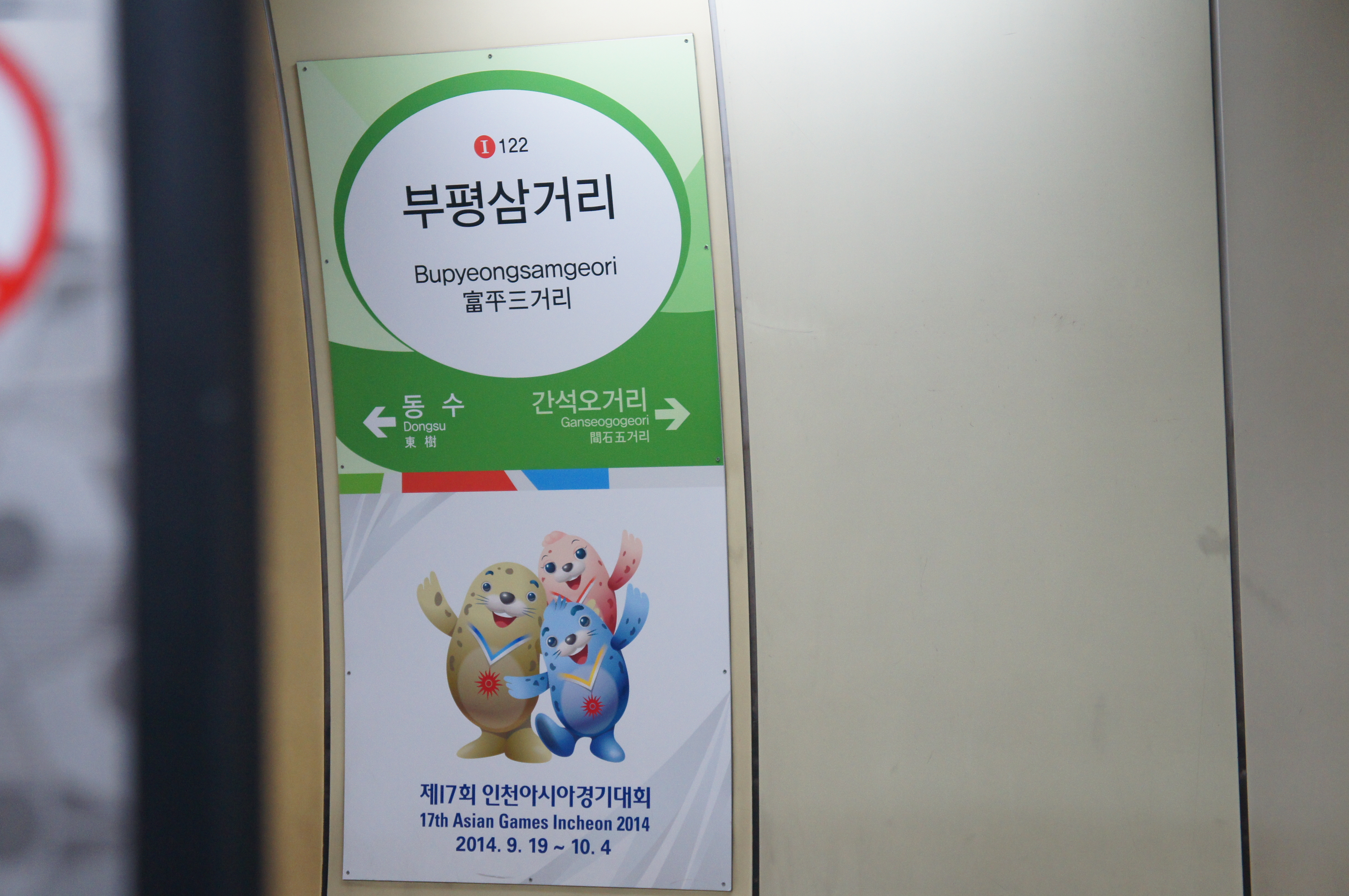 부평삼거리역 역명판